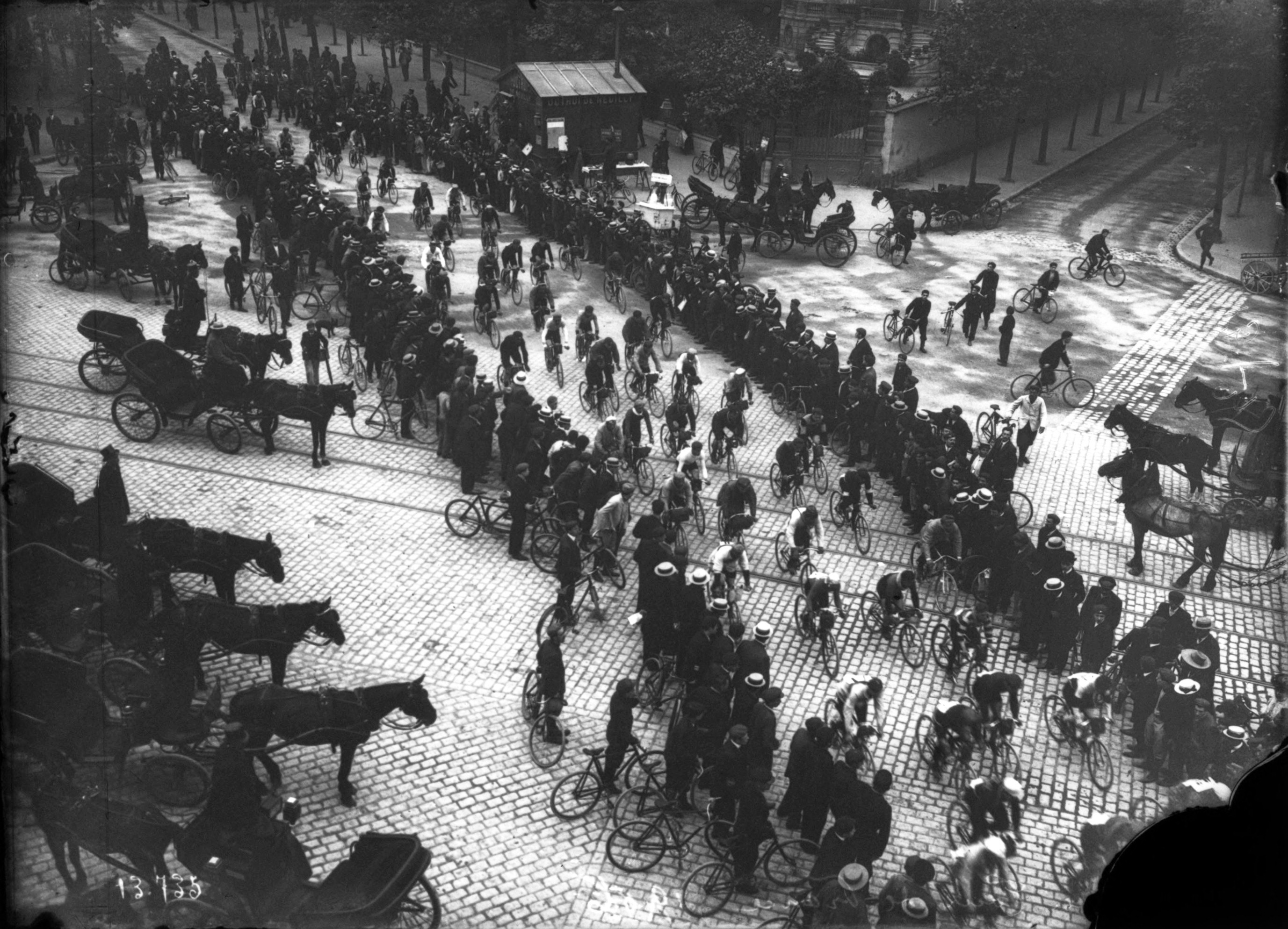 Tour de France 1906. Vue plongeante sur une étape de la course.